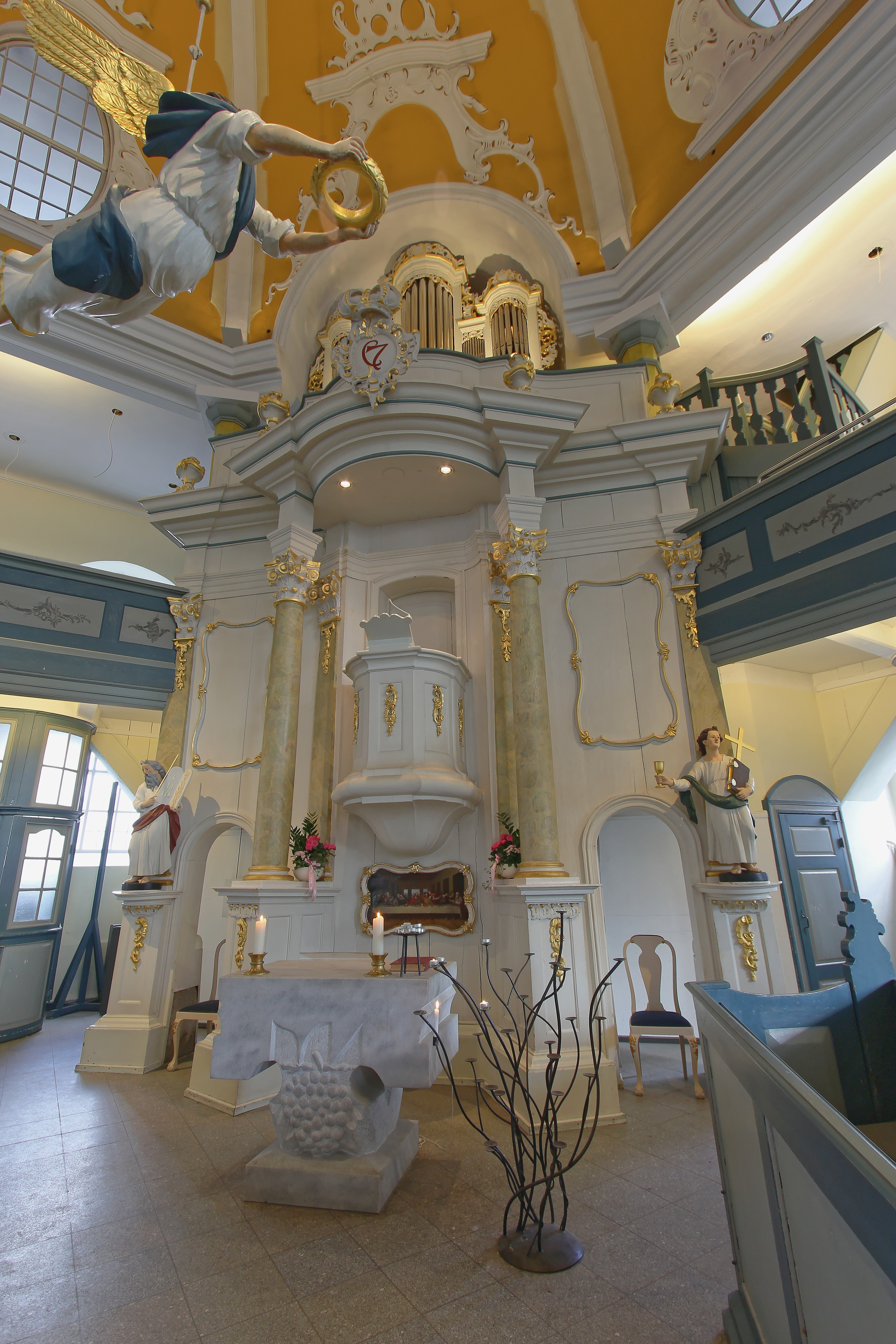 Hamburg-Niendorf, Niendorfer Marktkirche Kanzelaltar